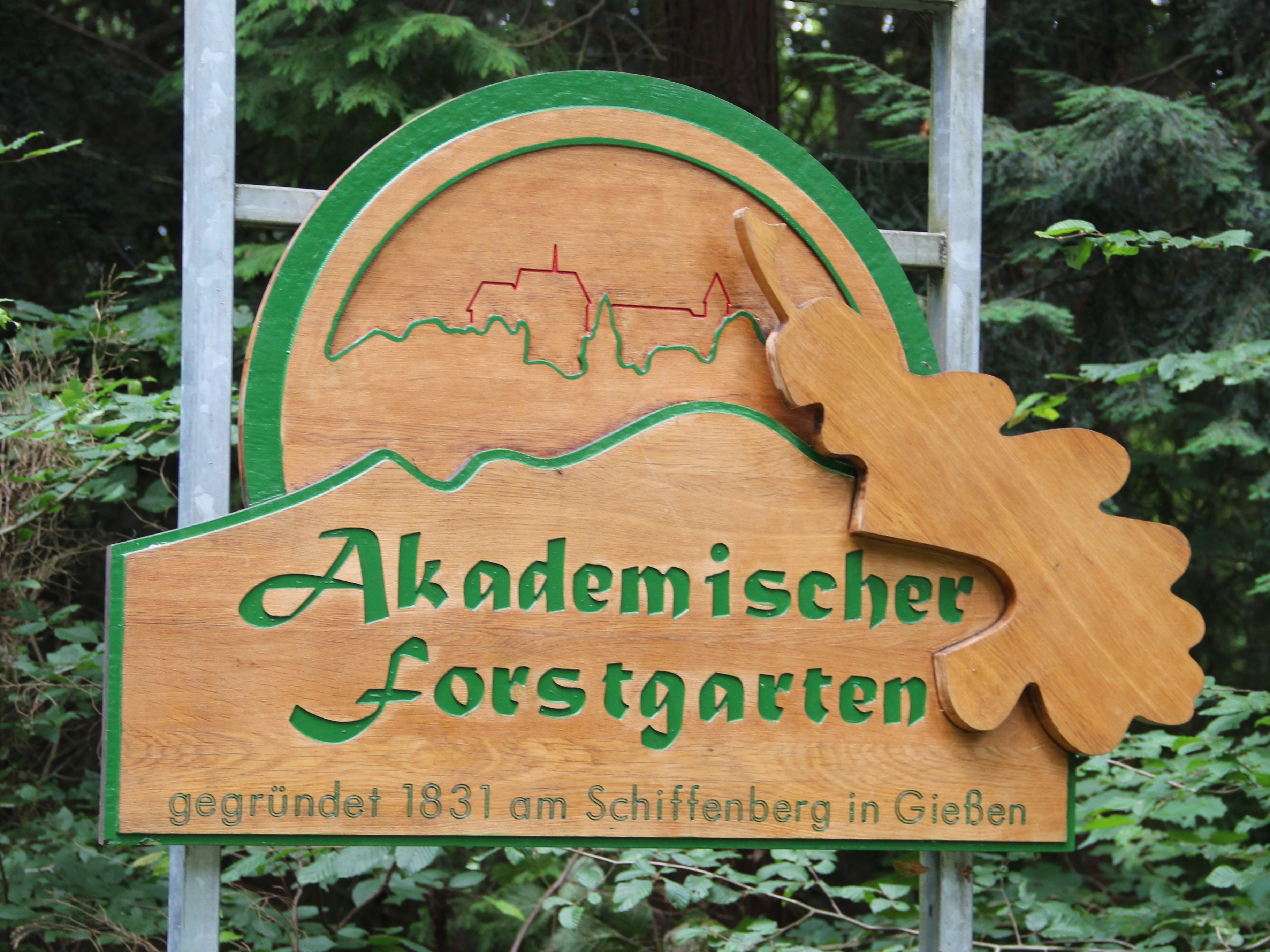 Schiffenberg